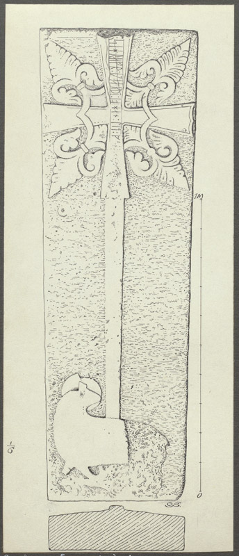 Medeltida lock till gravkista med runinskrift, signerat av stenmästaren Sigraf. Nu i Gotlands länsmuseum. Tuschteckning av Olof Sörling. Motiv: Sproge kyrka Kategori: (09) Gravar, TeckningMedeltida lock till gravkista med runinskrift G 69, signerat av stenmästaren Sigraf. Nu i Gotlands länsmuseum. Tuschteckning av Olof Sörling.